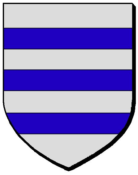 Blason de la Ville de Molliens-Dreuil